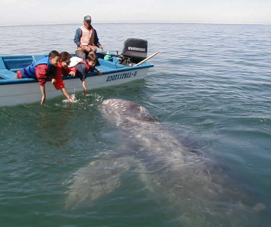 Observación de la Ballena Gris en Laguna San Ignacio en lancha.